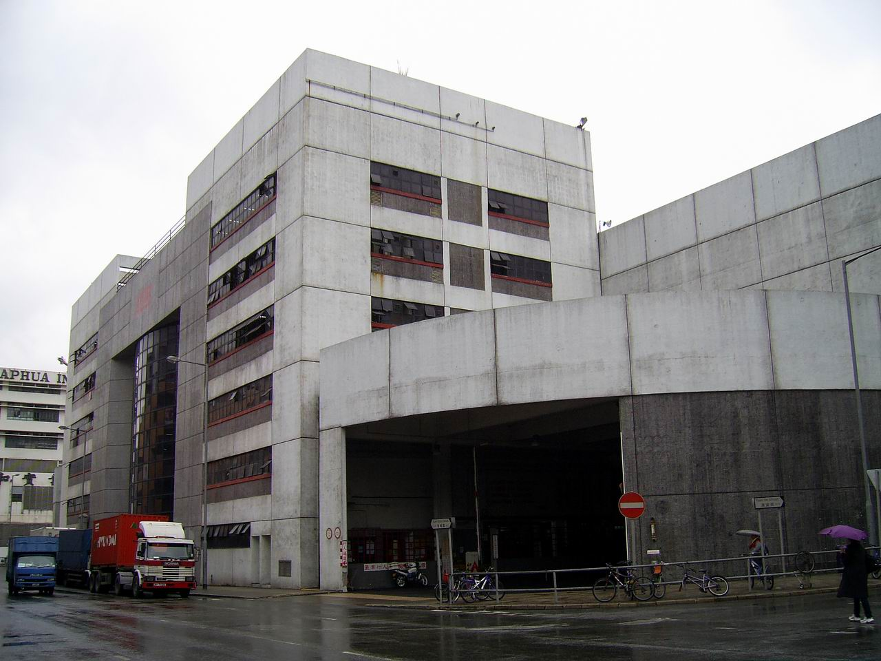 位於小瀝源的沙田巴士廠